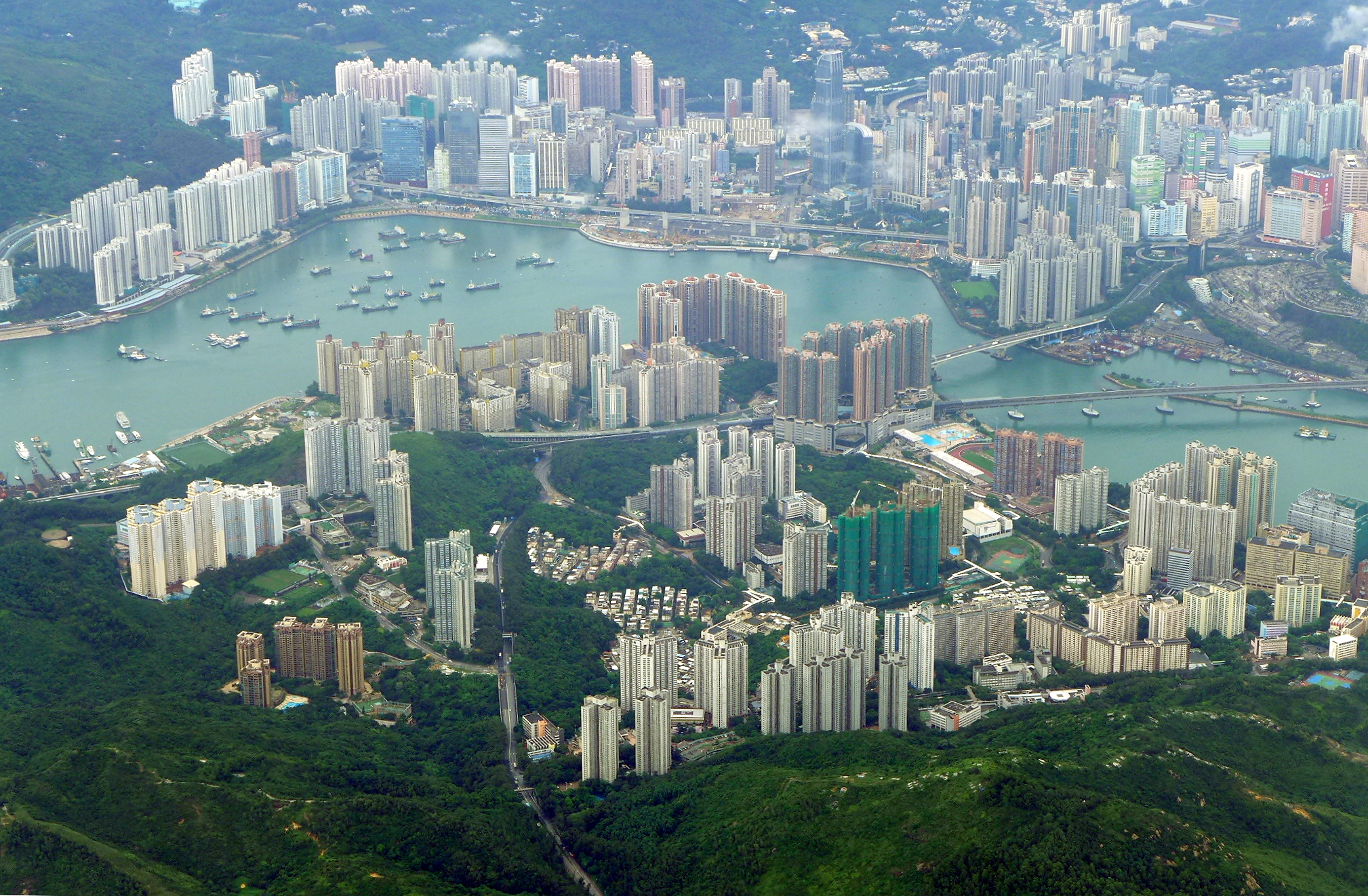 Buildings in Tsing Yi